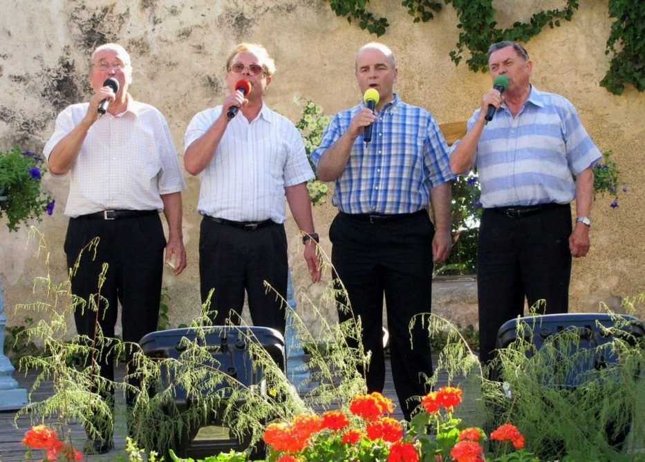 Fantje s Praprotna na festivalu Vurberk 2013.